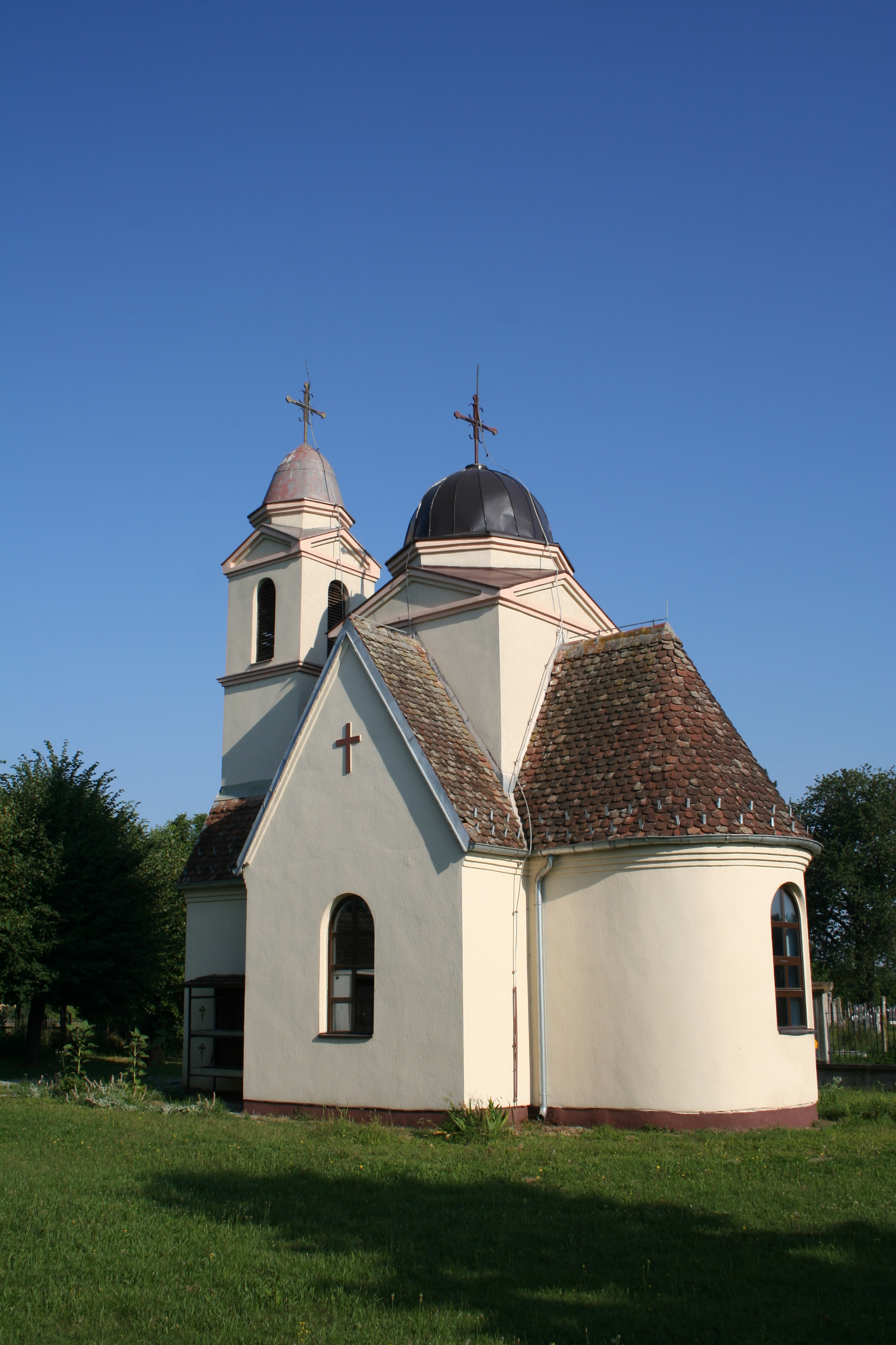 Crkva Sv. Marije Magdalene, Bogosavac